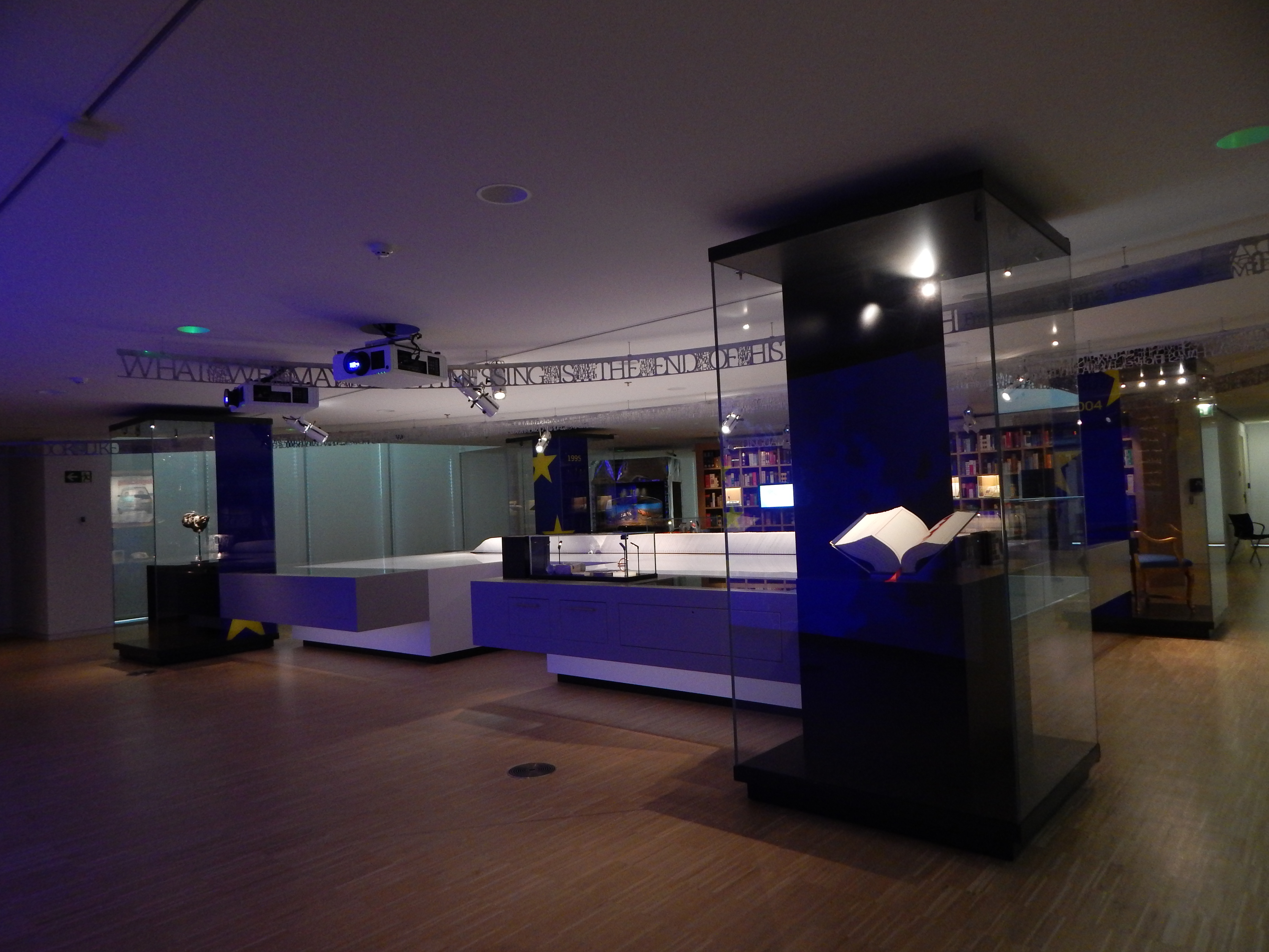 Intérieur de la Maison de l'Histoire européenne.